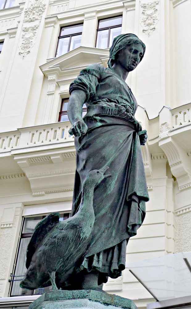 Gänsemädchenbrunnen an der Rahlstiege